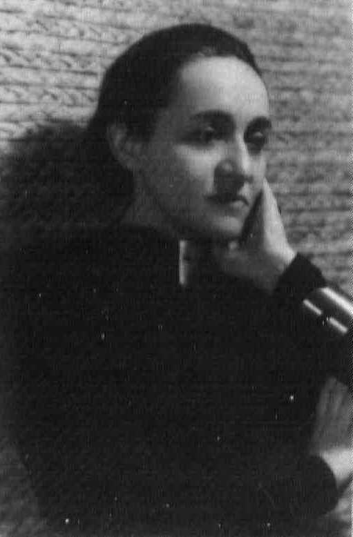 Retrato fotográfico Herminia Arrate